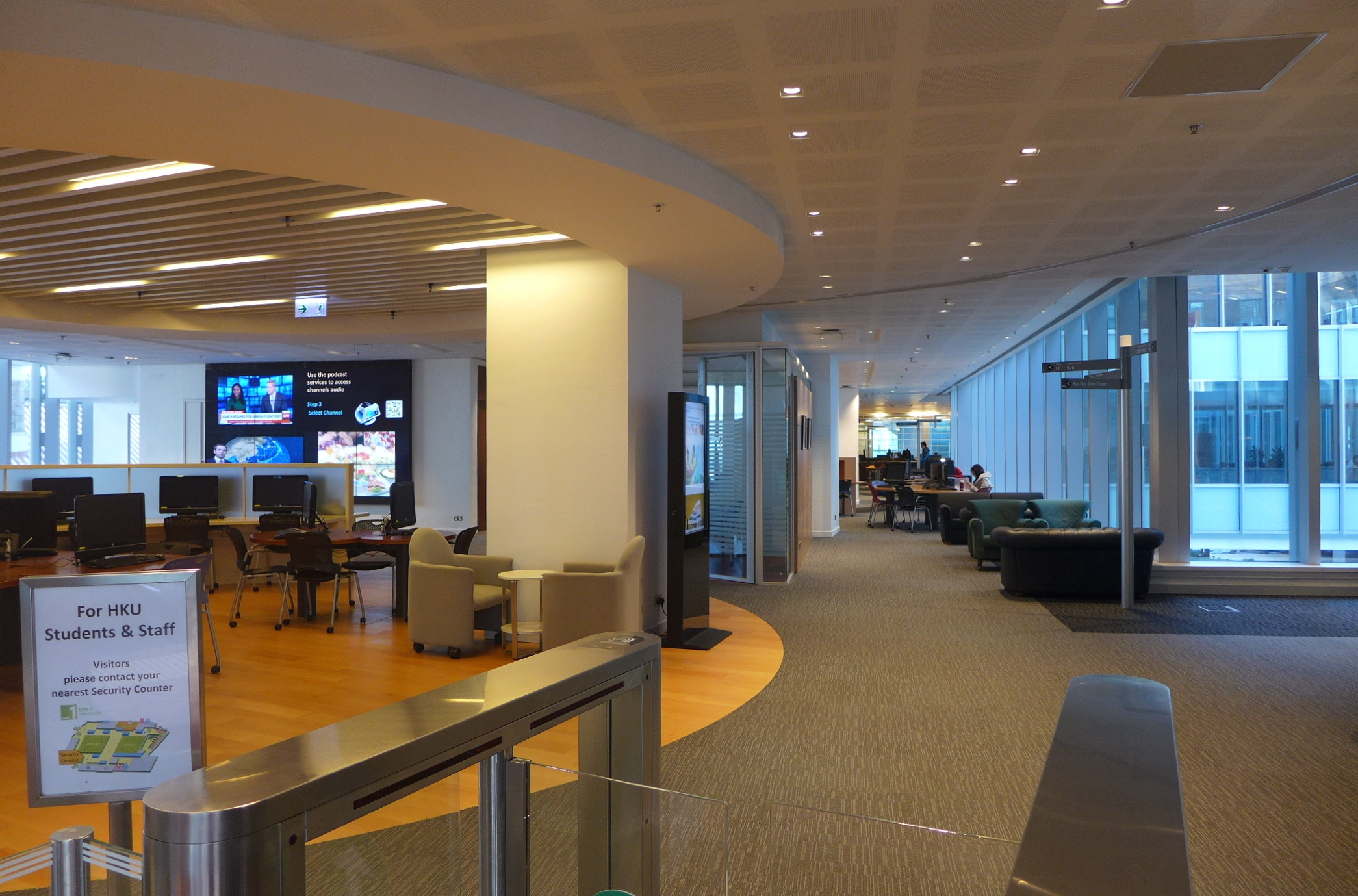 HKU Centennial Campus